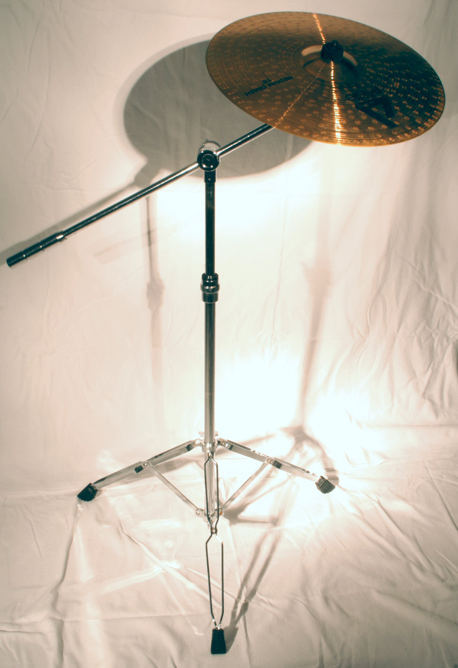 Crash - Cymbal